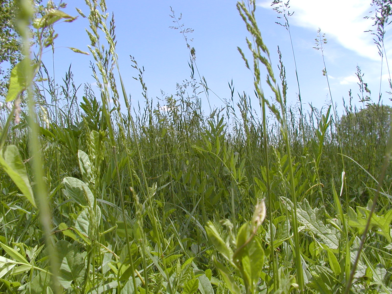 Louka v Toskánsku, Itálie